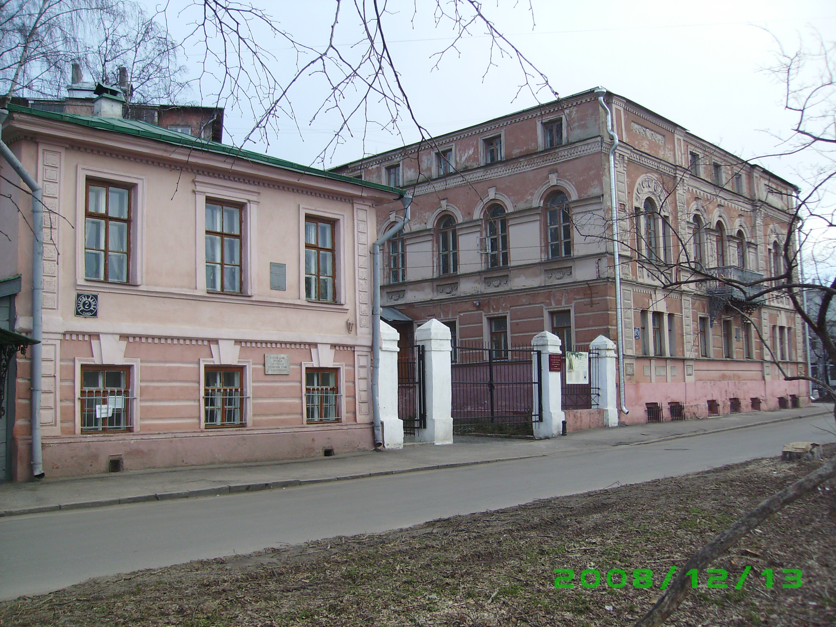 Усадьба Добролюбовых, музей Добролюбова, Нижний Новгород, Лыкова Дамба, 2, 2а